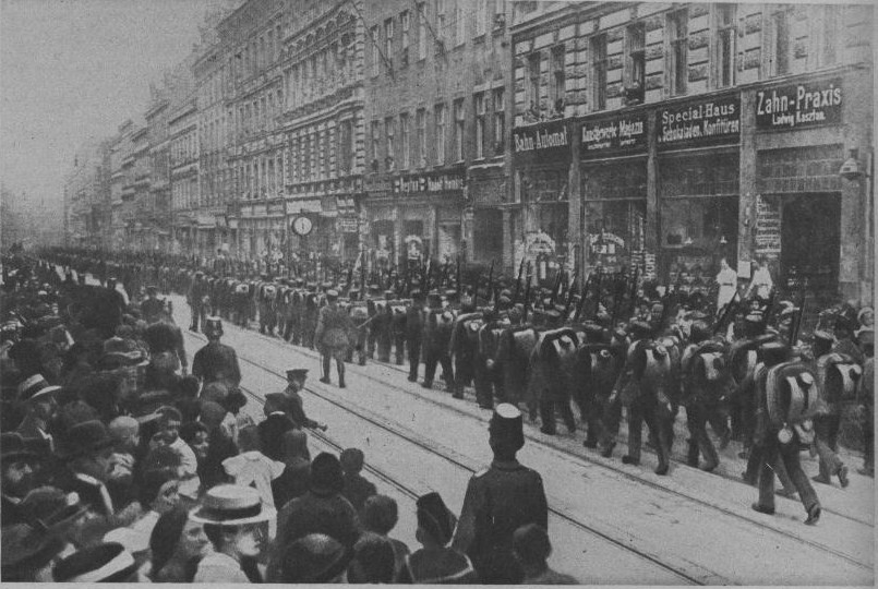 publié dans "le miroir".